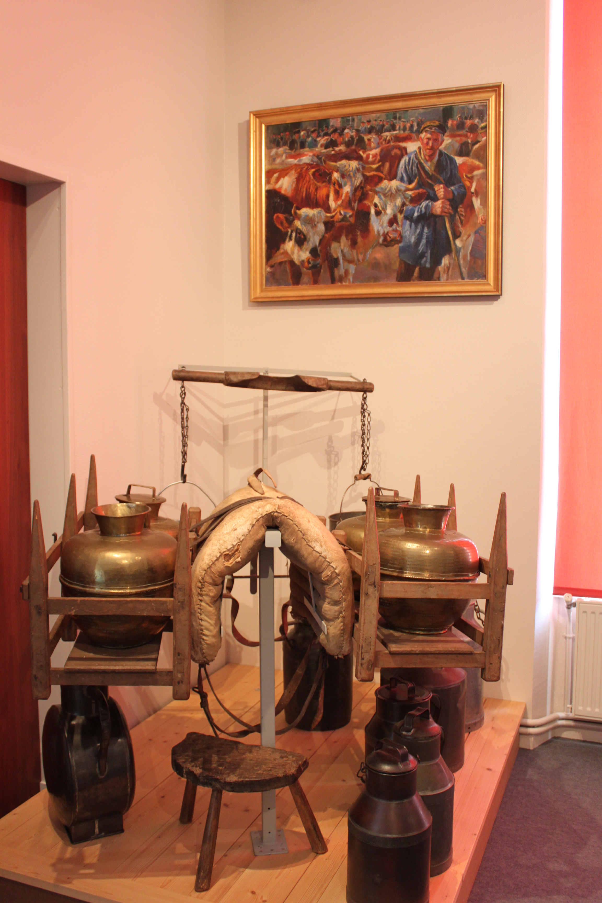 Caen, France